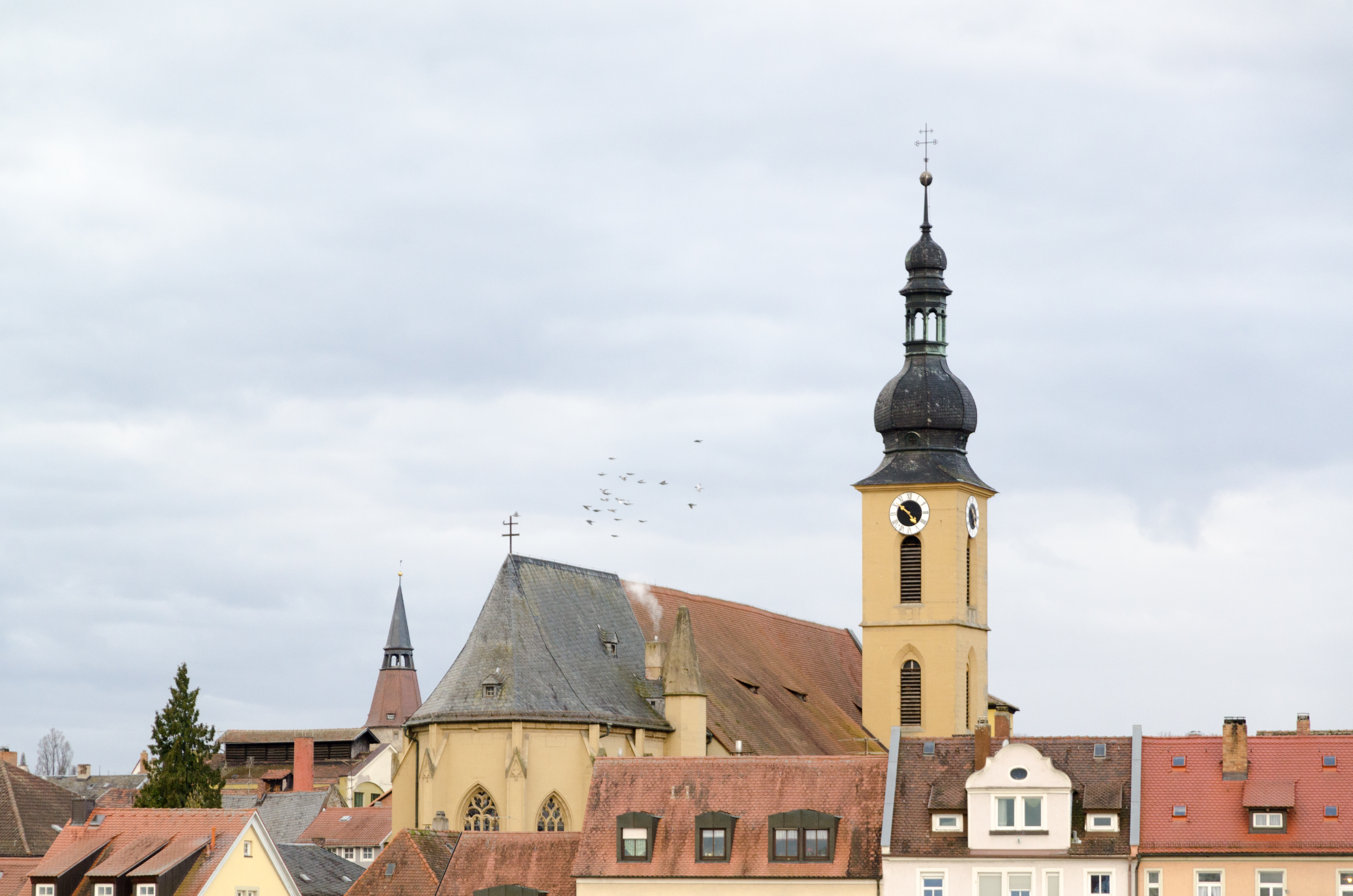 Kitzingen, Kath. Stadtpfarrkiche